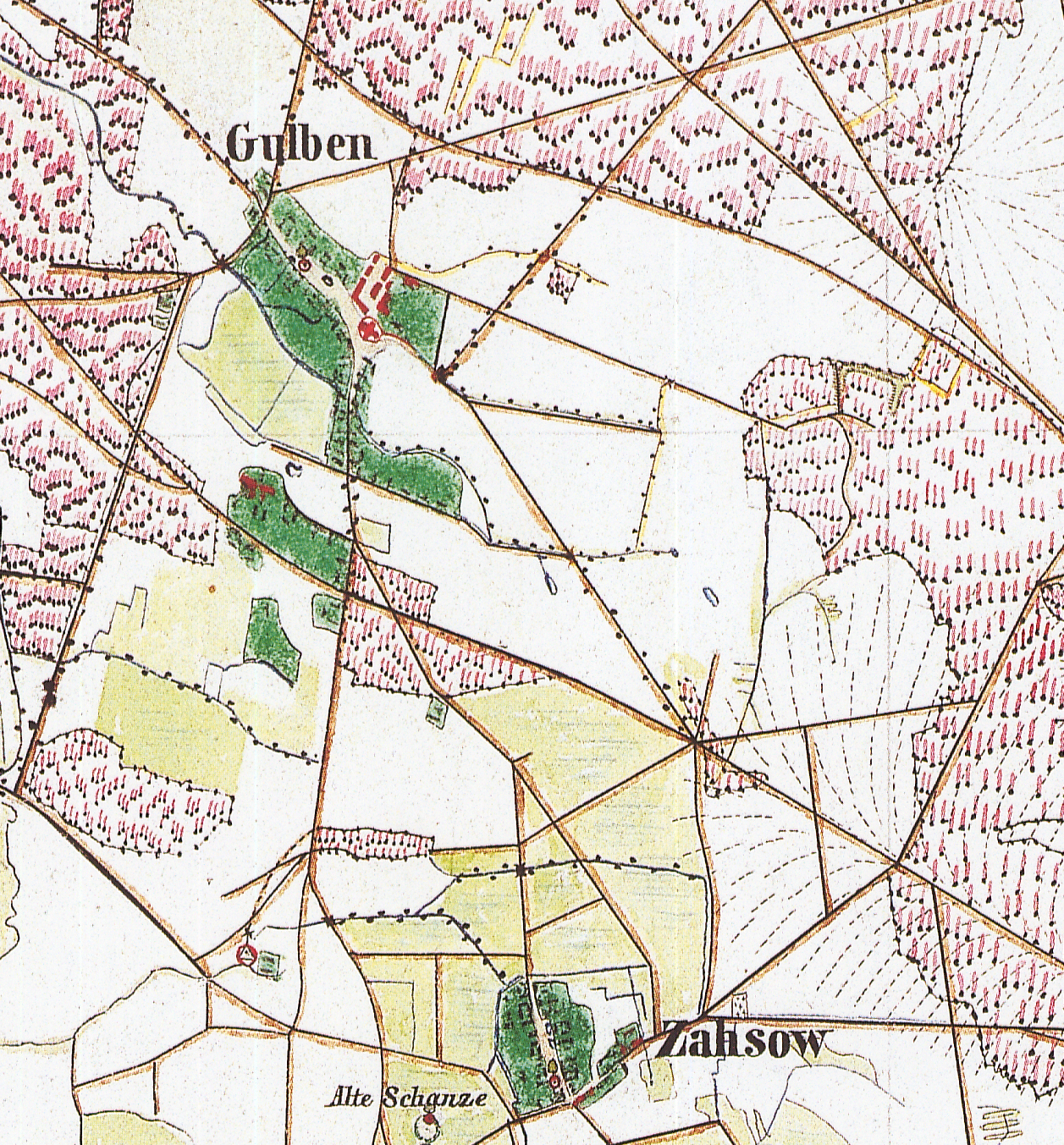 Gulben, Ortsteil der Gemeinde Kolkwitz, Lkr. Spree-Neiße, Brandenburg, Ausschnitt aus dem Irmesstischblatt 4251 Cottbus West von 1846